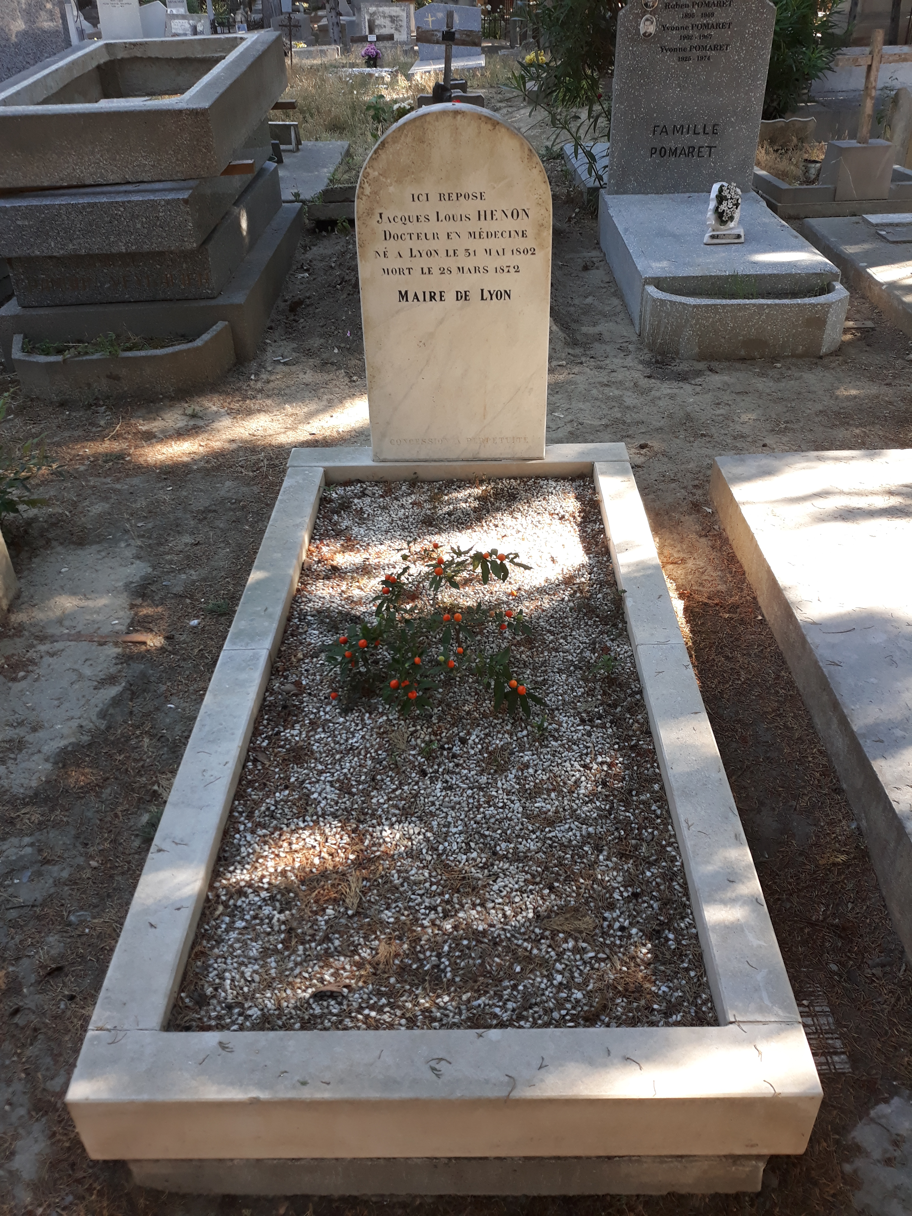 Das Grab des französischen Botanikers und Bürgermeistsers von Lyon Jacques-Louis Hénon auf dem protestantischen Friedhof von Montpellier.